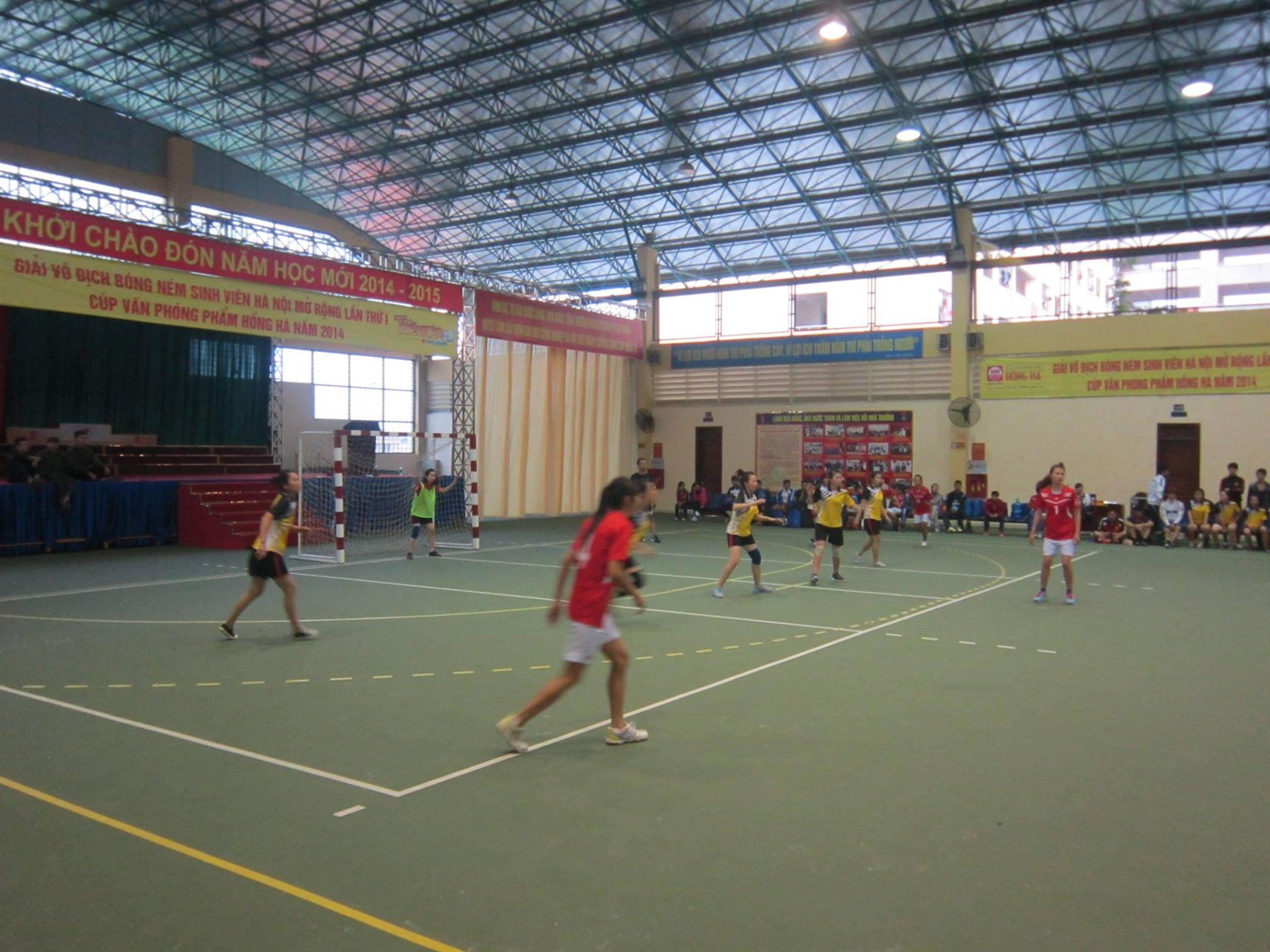 Một cuộc thi đấu bóng ném tại nhà Đa năng A1